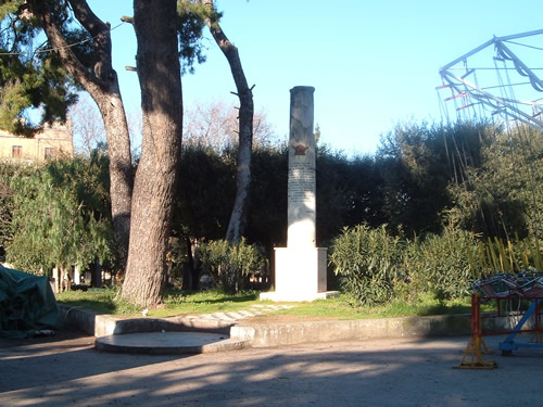 Il monumento dedicato a Scipione l'Africano, nella villa comunale.